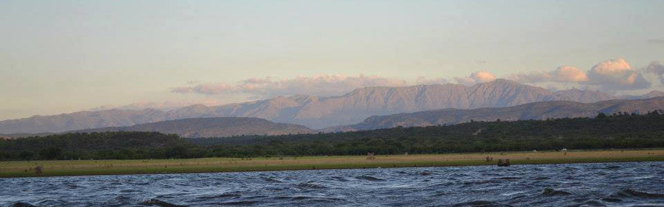 Embalse Cruz del Eje